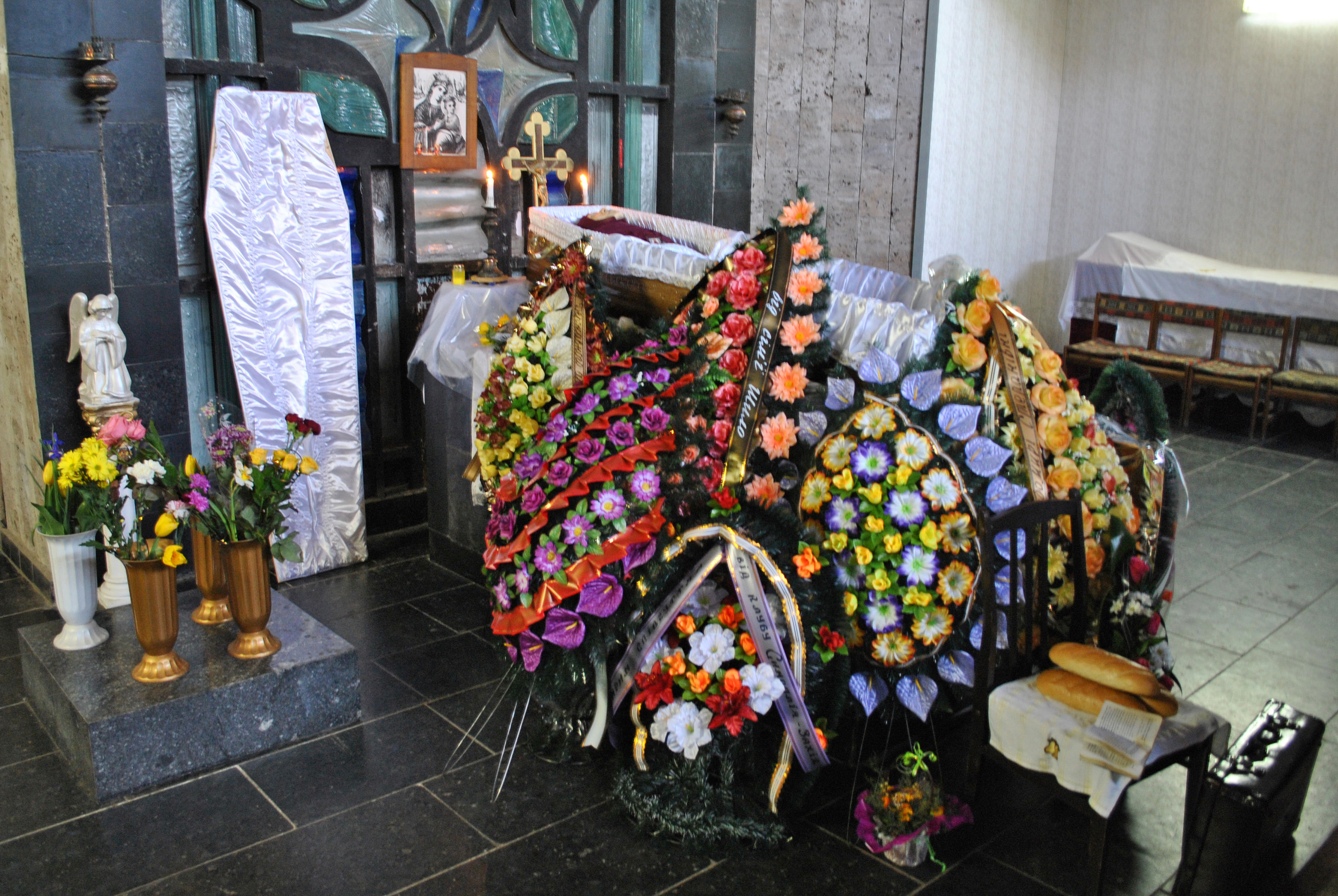 Похорон українського архівіста, краєзнавця, членкині ВУСК, уродженки м. Тернополя, авторки книги «Тернопіль у плині літ» Любомири Степанівни Бойцун (м. Тернопіль, Дім печалі, 6 березня 2015 року).